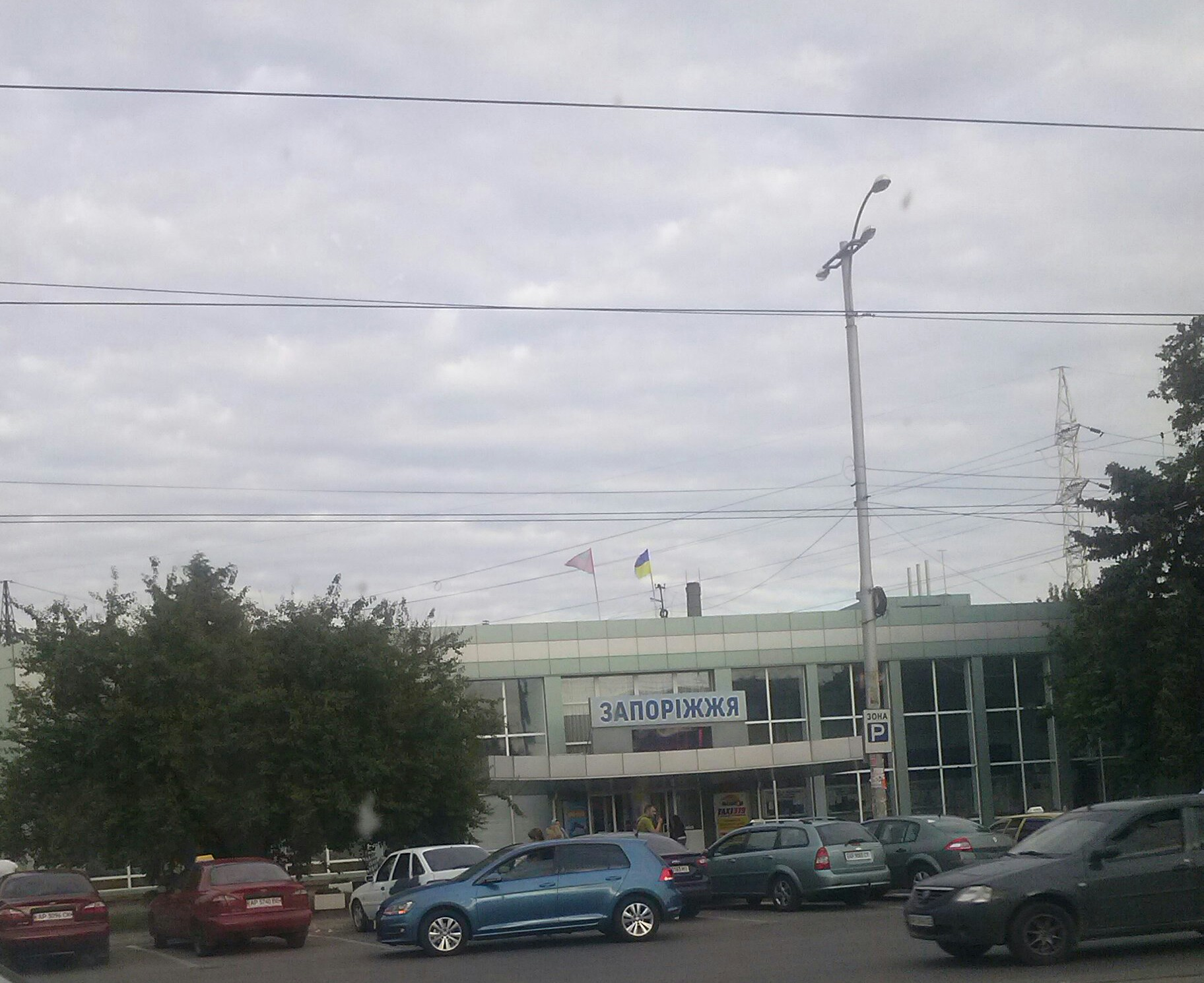 Вид з проспекту Соборного